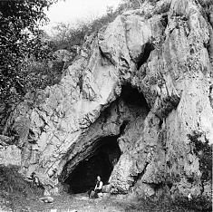 Eingang zur Höhle Wildscheuer um 1925, Steeden, Runkel (Lahn), Hessen, Deutschland